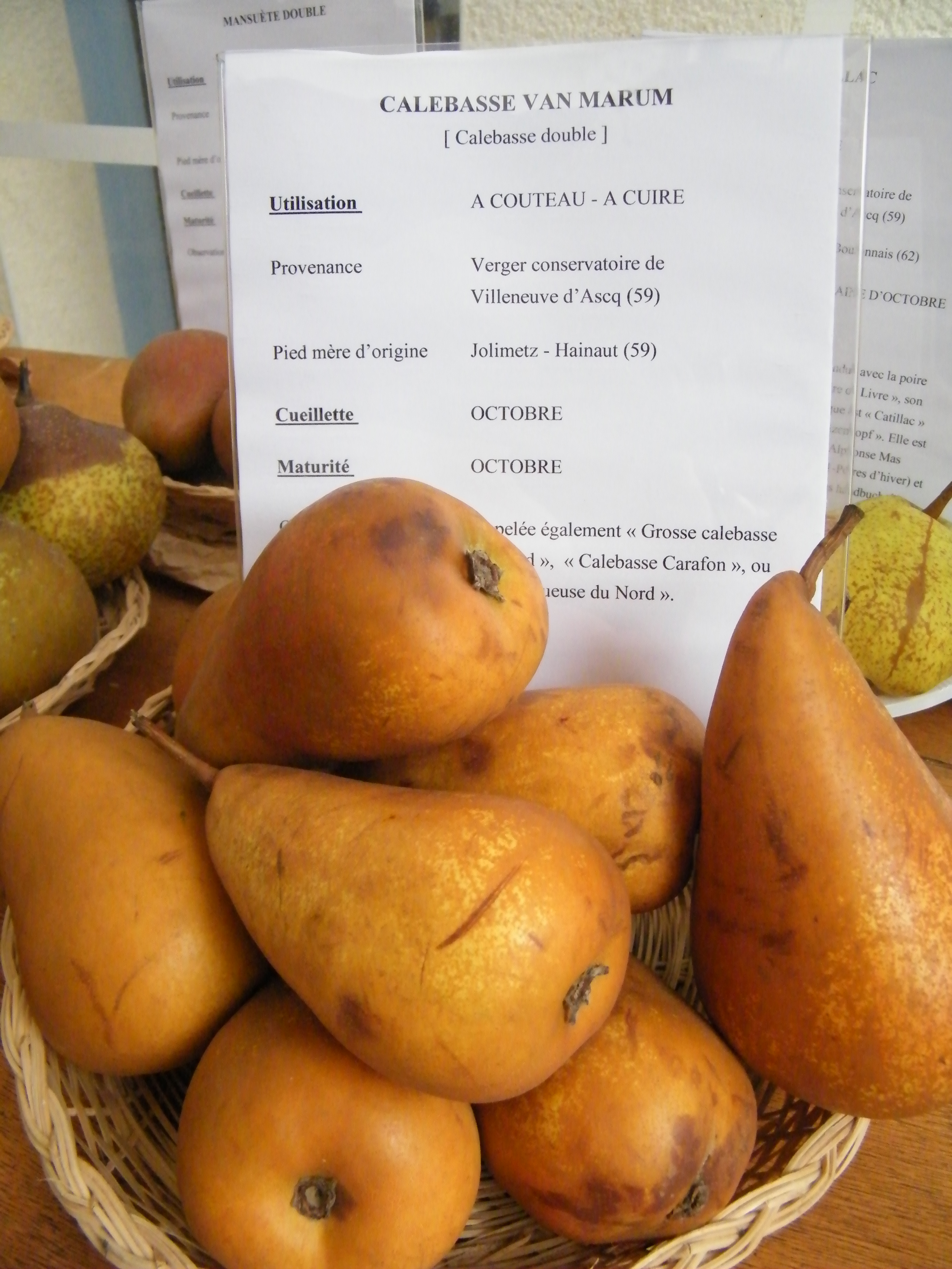 Calebasse Van Marum, Mons-Boubert, Somme, Fr, expo du 29-10-2017 (118)